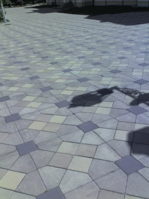 Pflastersteine in Franzensbad (Tschechien)